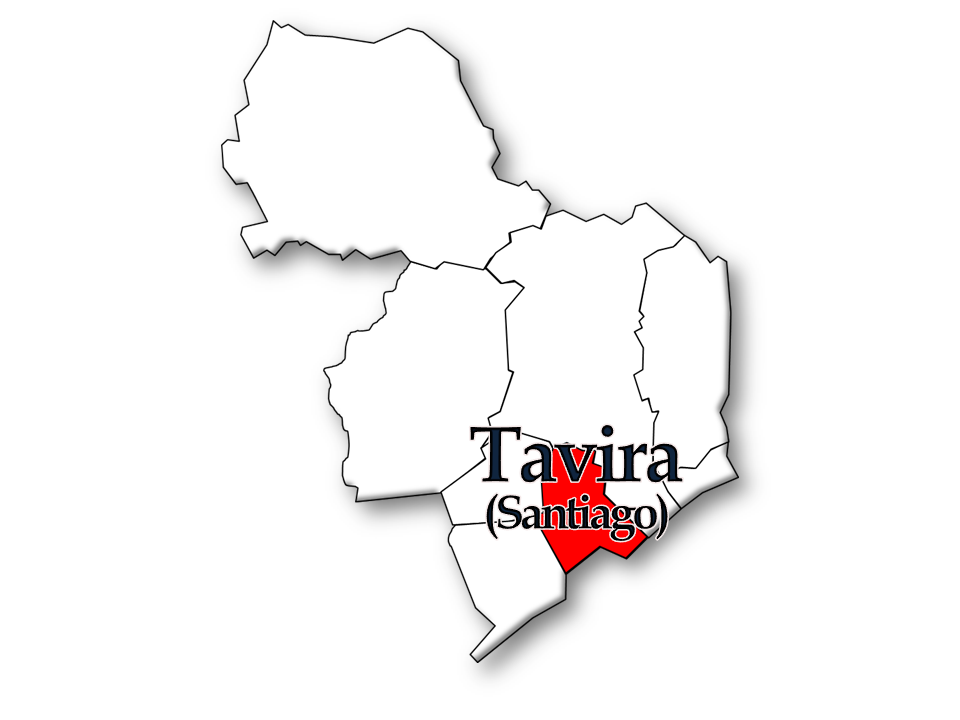 Censos 1864/2011